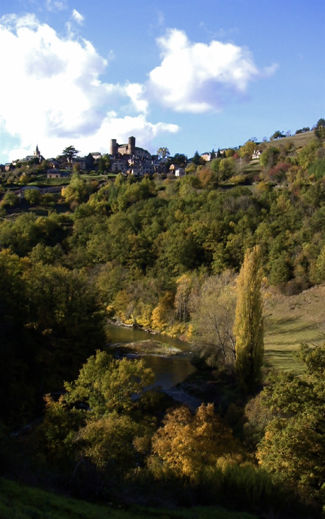 Vallée du Lot, Pomayrols (Aveyron, France)